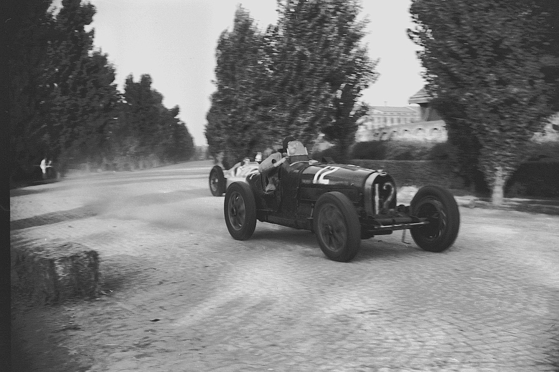 Preteča formule 1 na Kalemegdanu - Međunarodne automobilske i motociklističke trke održane 3. septembra 1939.